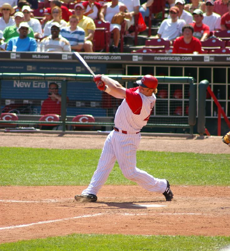 good form